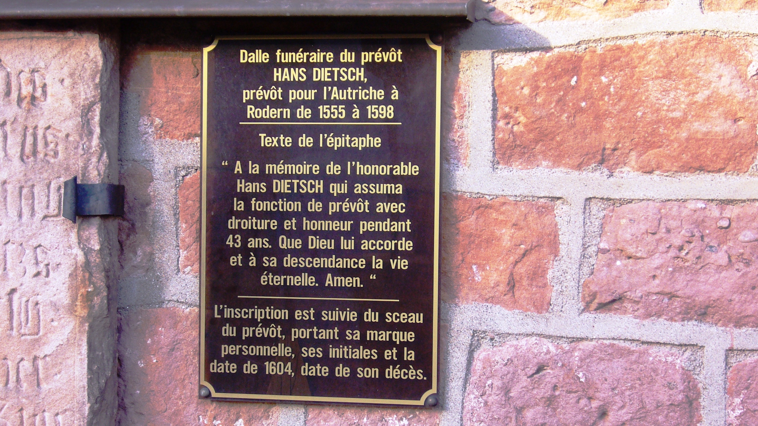 Rodern